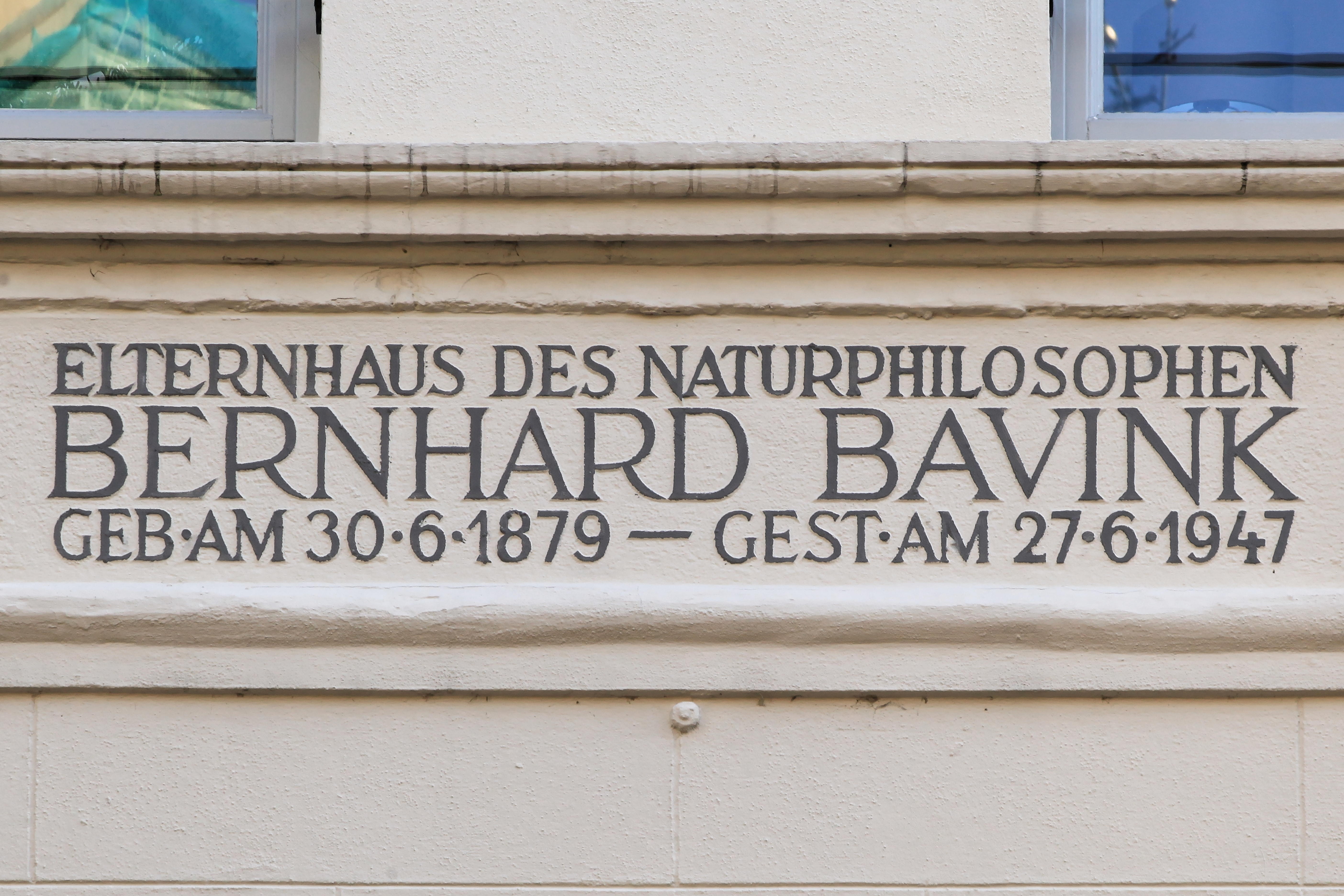 Brunnenstraße 22 in Leer (Ostfriesland)